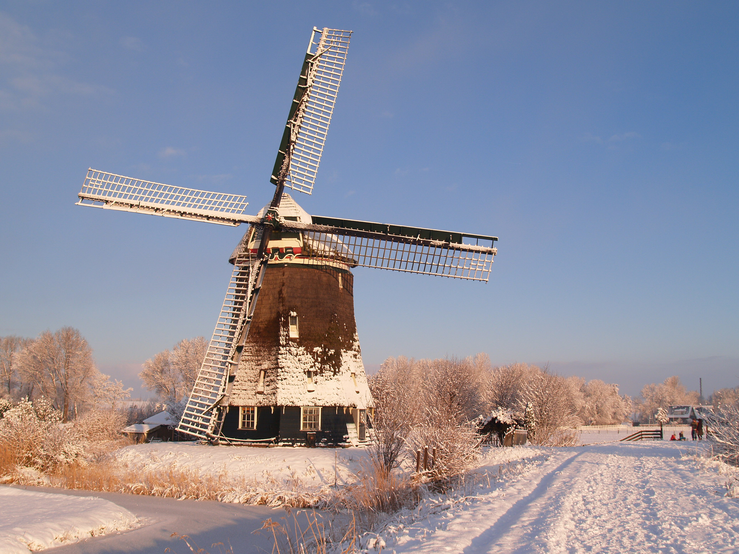 Prachtig winterlandschap met daarin de Twuyvermolen te Sint Pancras, Langedijk, Noord-Holland